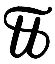 Tegnet for pund (vægt) = et halvt kilogram.